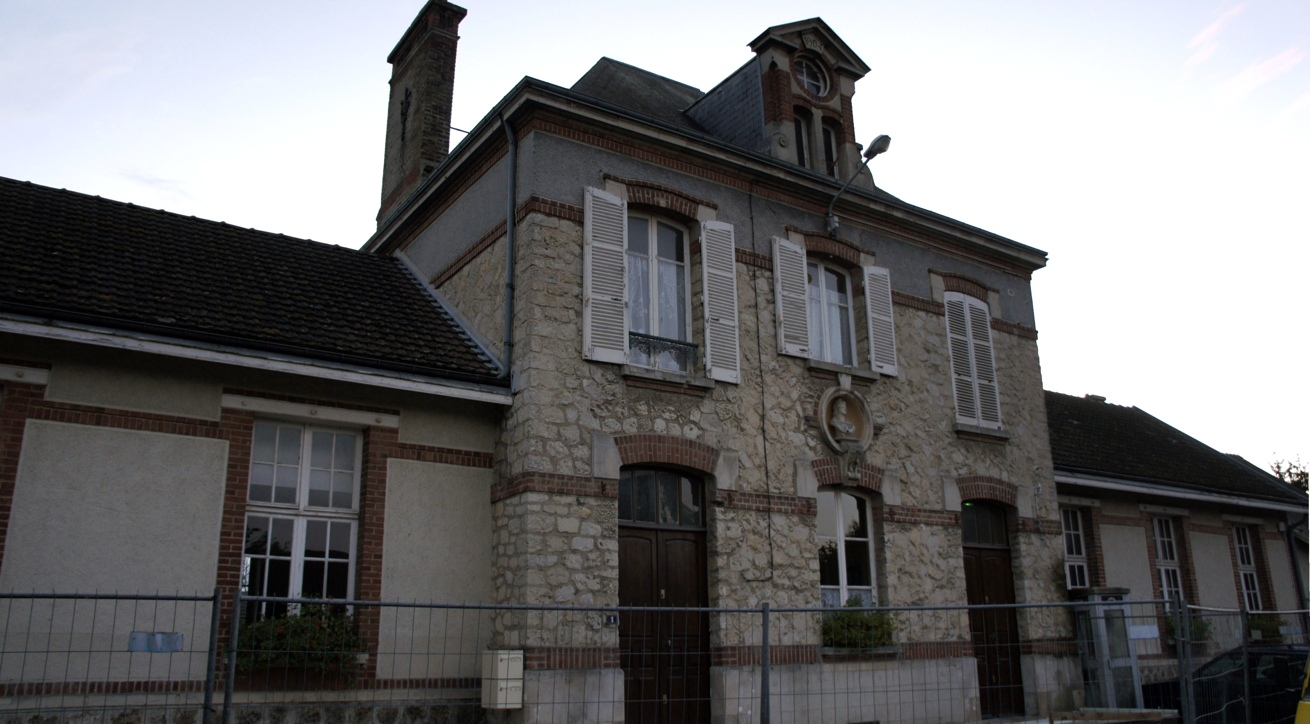 La Mairie_à Puisieulx.